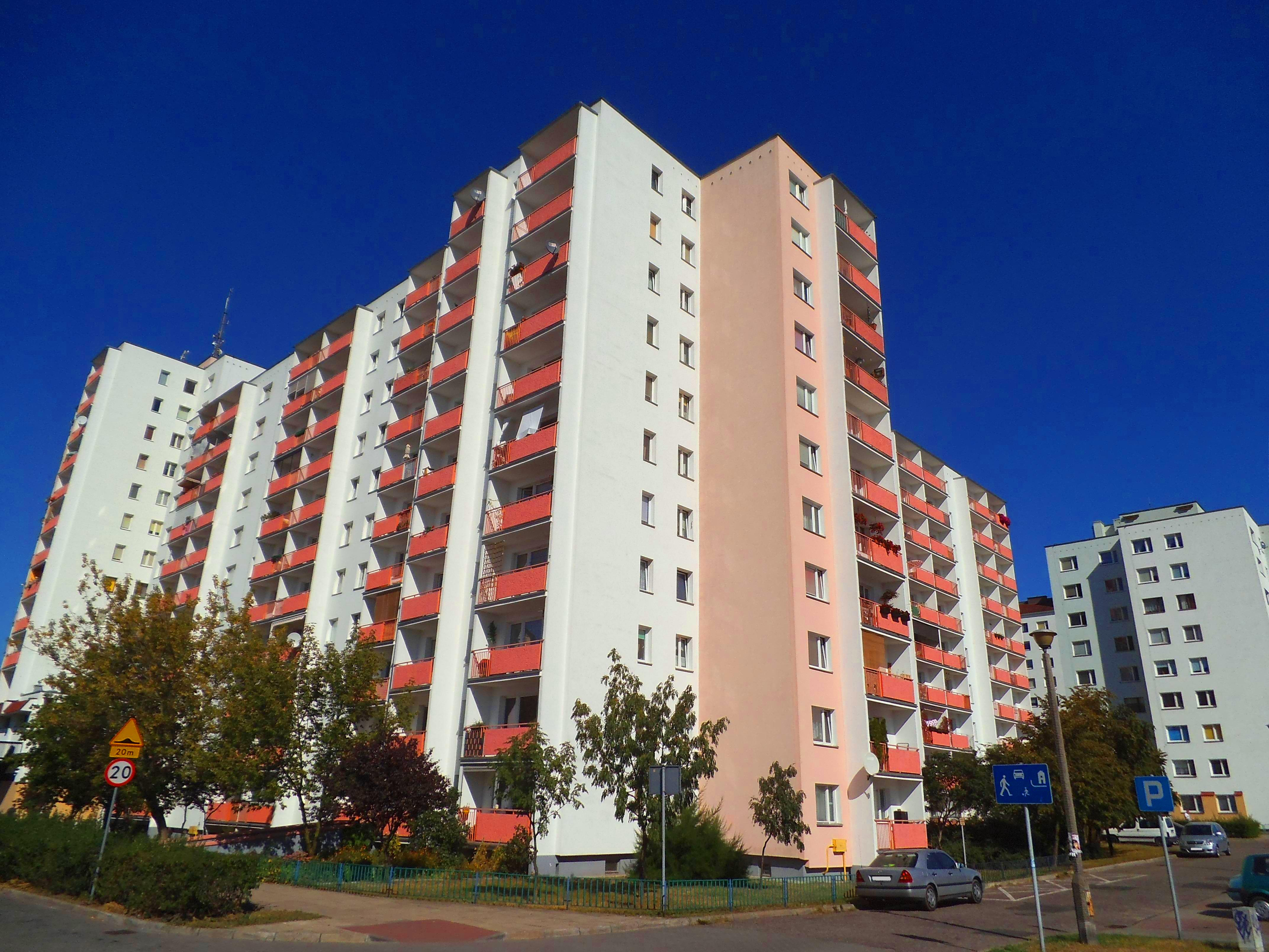 Fragment zabudowy wielorodzinnej przy ulicy Konstytucji 3 Maja w Toruniu